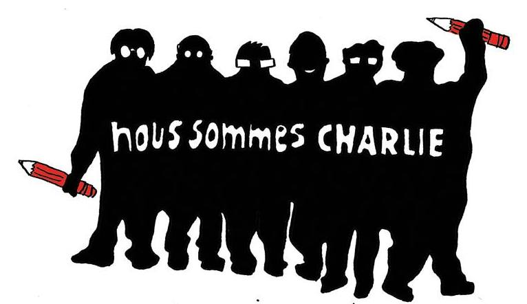 Nous sommes Charlie, par Pauline Aubry - Les étudiants du CESAN rendent hommage